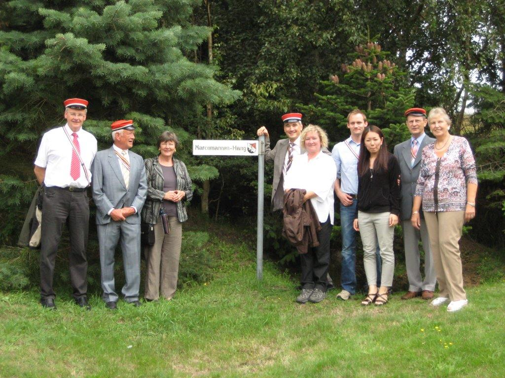 Angehörige des Corps Marcomannia Breslau mit ihren Ehefrauen am Hinweisschild, das an ihre jahrzehntelange Mitarbeit an der Bepflanzung des Dünenfriedhofs Langeoog erinnert.